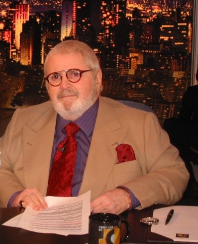 José Eugênio Soares, mais conhecido como Jô Soares ou simplesmente Jô (Rio de Janeiro, 16 de janeiro de 1938), é um humorista, apresentador de televisão, escritor, artista plástico, dramaturgo, diretor teatral, ator e músico brasileiro.